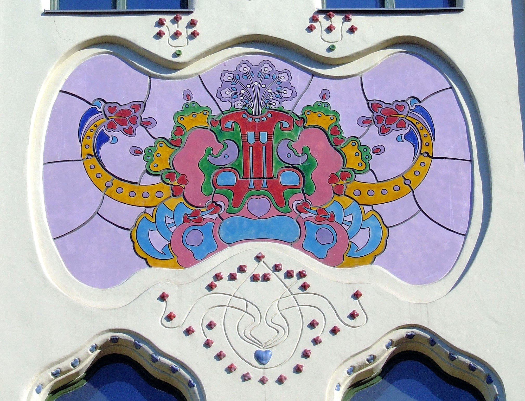 A pécsi Zsolnay gyárban készített majolika díszítés a kecskeméti Cifra palotán